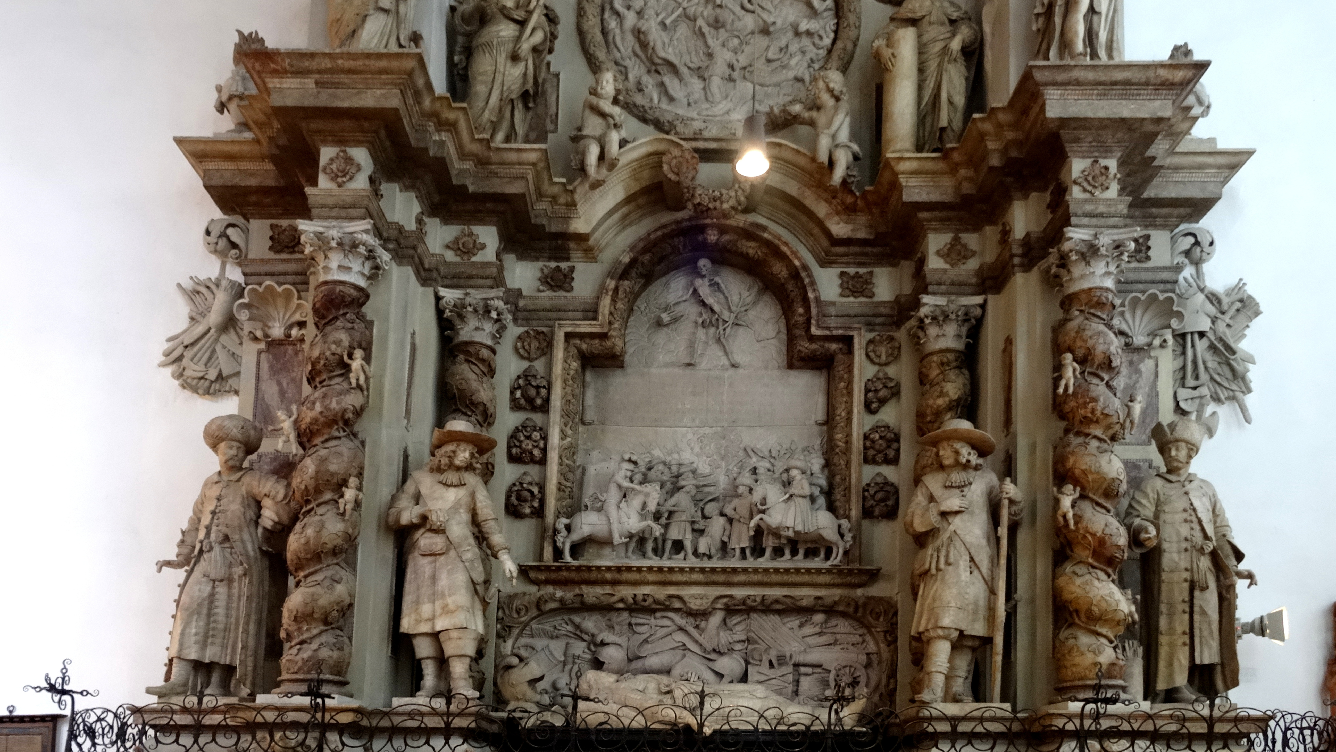 Stadtkirche Bad Wildungen Grabmal des Grafen Josias 2. von Waldek